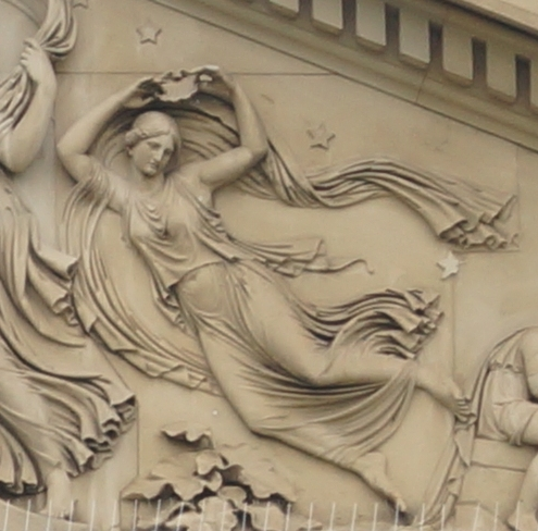 Friedrich Distelbarth: Artemis-Selene-Relief (1830), Ausschnitt. Die jugendliche Taugöttin Ersa schwebt hinter ihrer Mutter Selene einher und benetzt aus einer Muschel mit Tau die Erde.